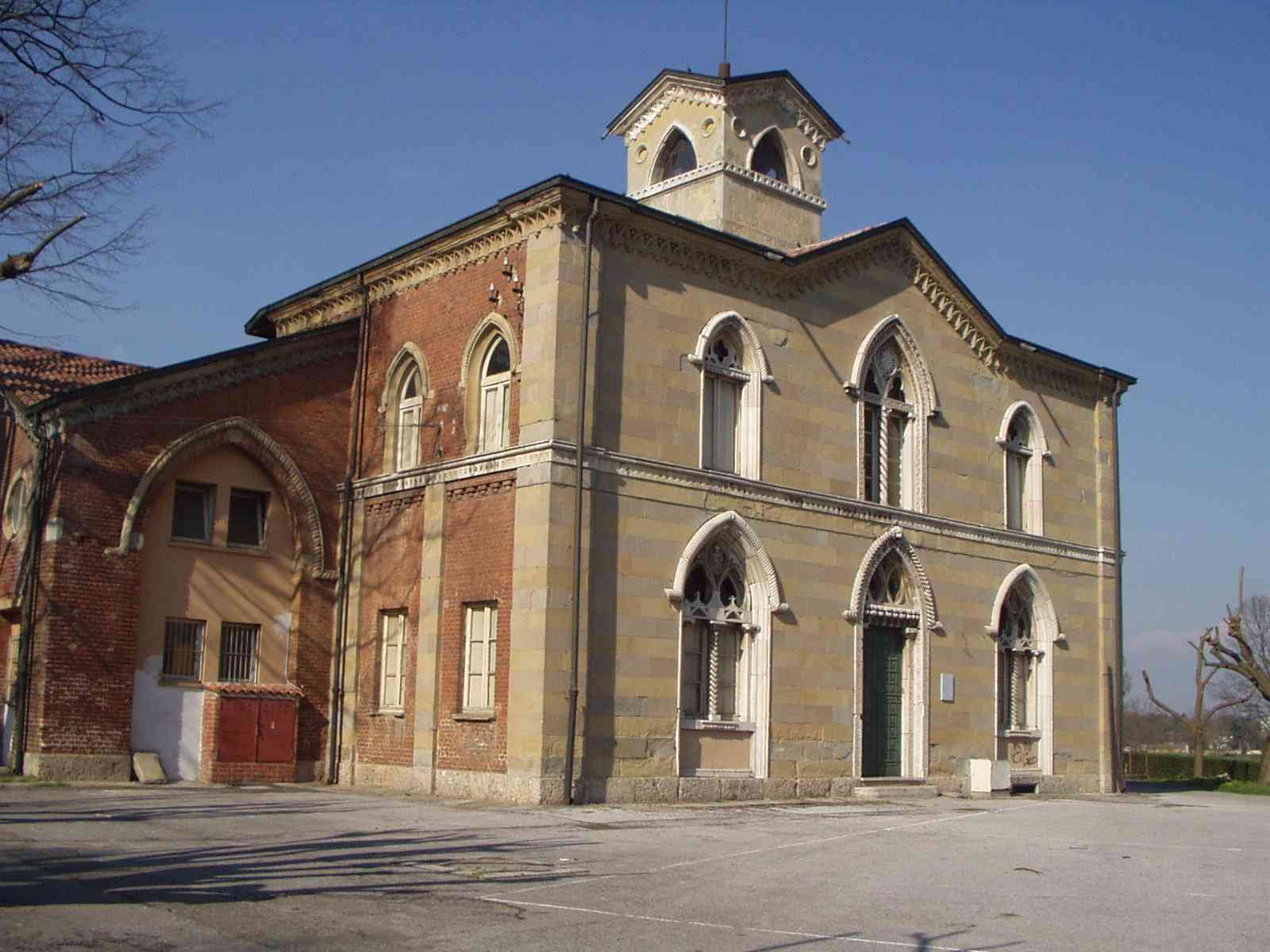 MB Monza Parco della Villa Reale cascina San Fedele